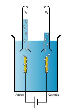 Schémas de la synthèse d'hydrogène et d'oxygène par électrolyse de l'eau Par : Nécropotame